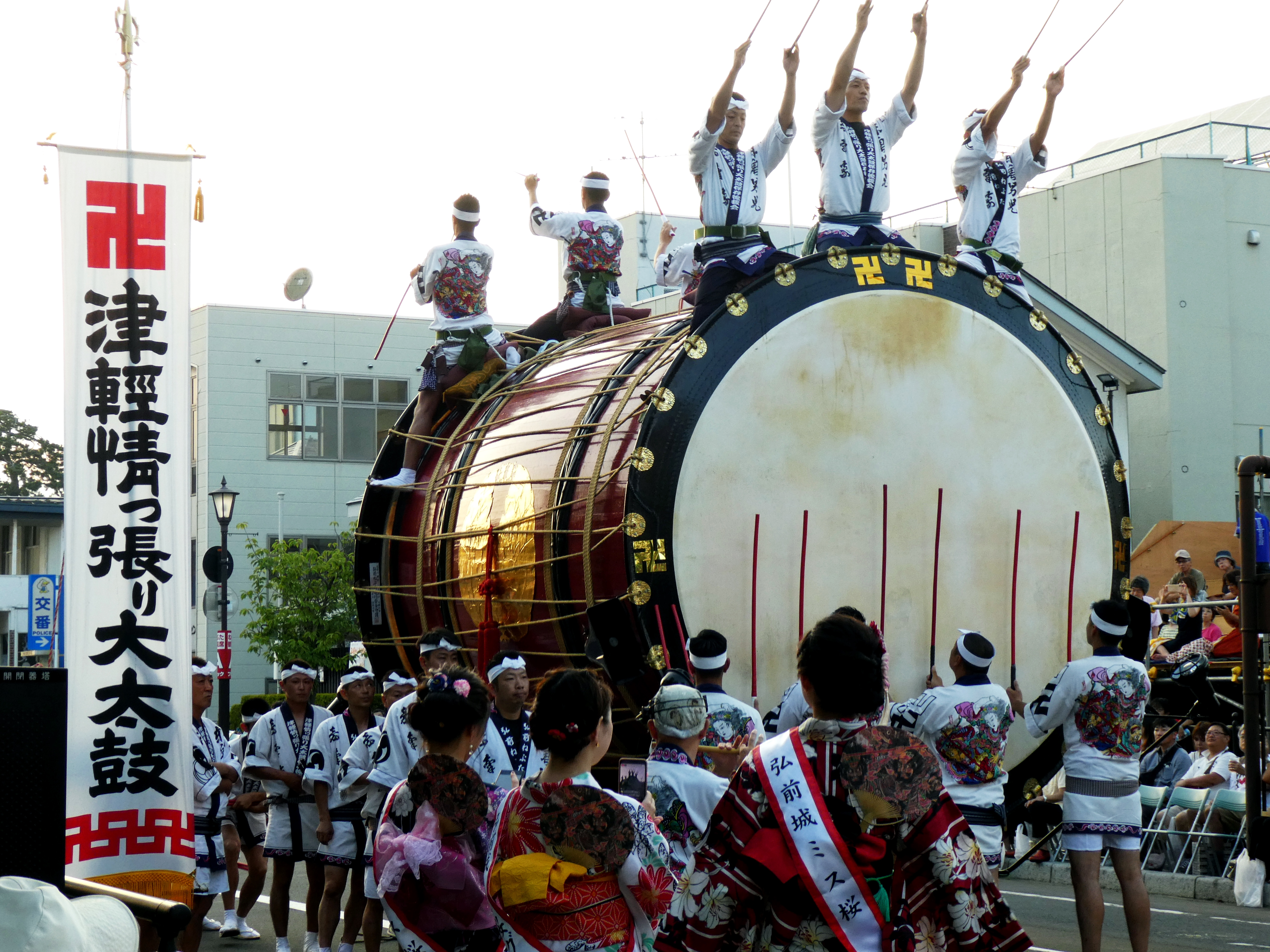 弘前ねぷたまつり 津軽情っ張り大太鼓： 青森県弘前市 2019年8月4日